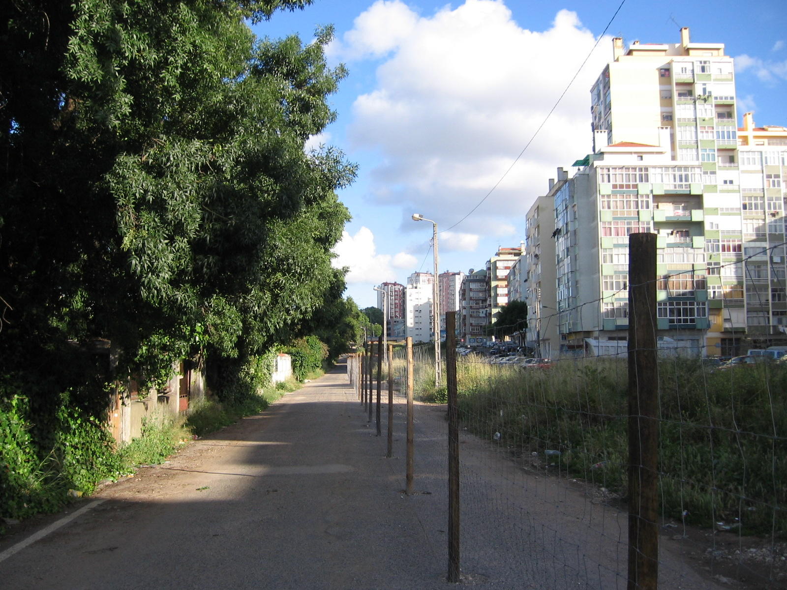 Estrada da Circunvalação entre a Damaia de Baixo e o Bairro de Santa Cruz, Benfica, Lisboa